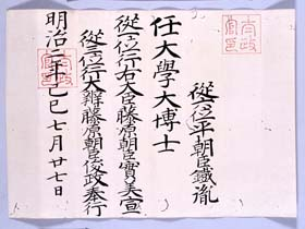 平田銕胤「任大学大博士」辞令（明治2年（1869年）7月27日）